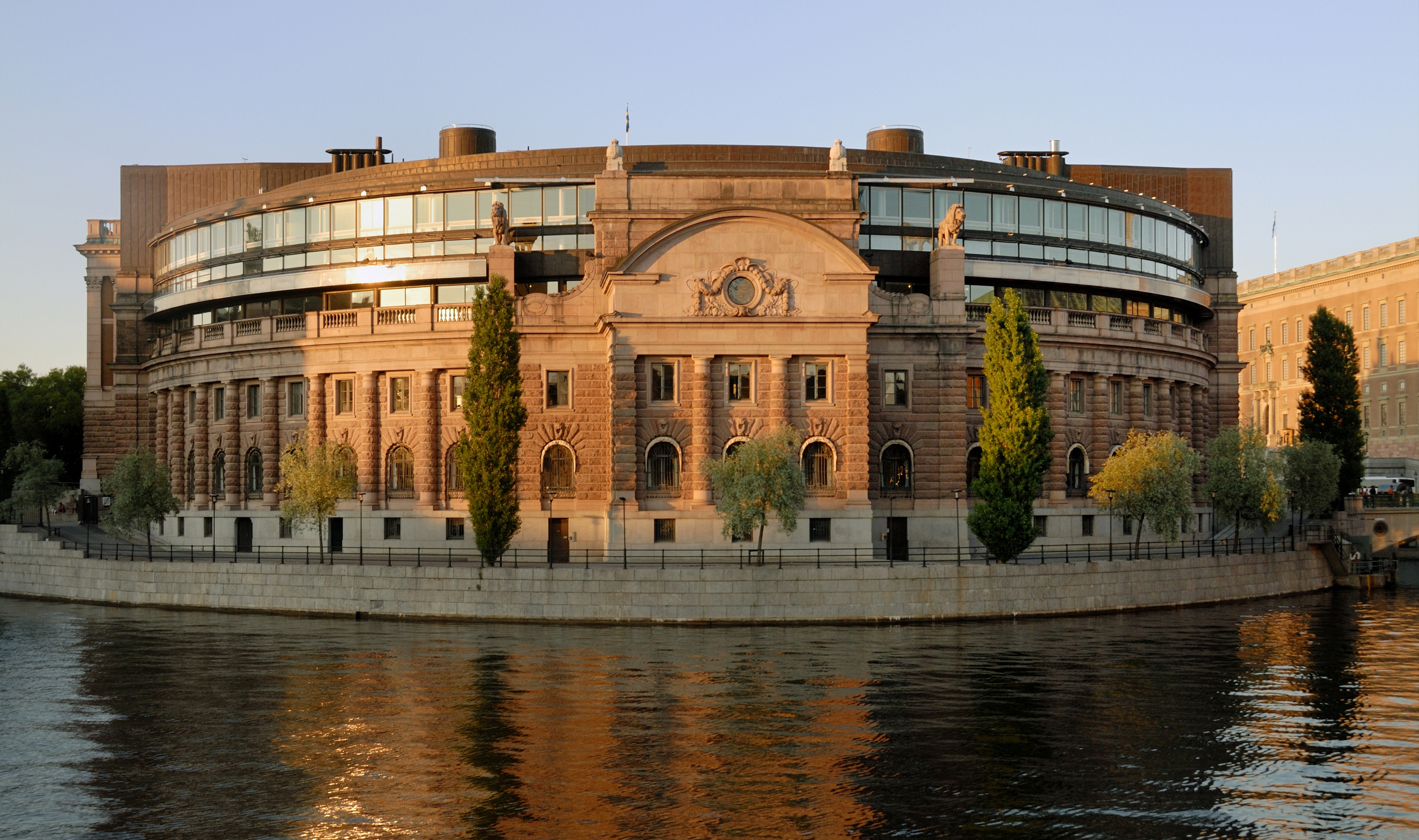 Reichstagsgebäude, Stockholm